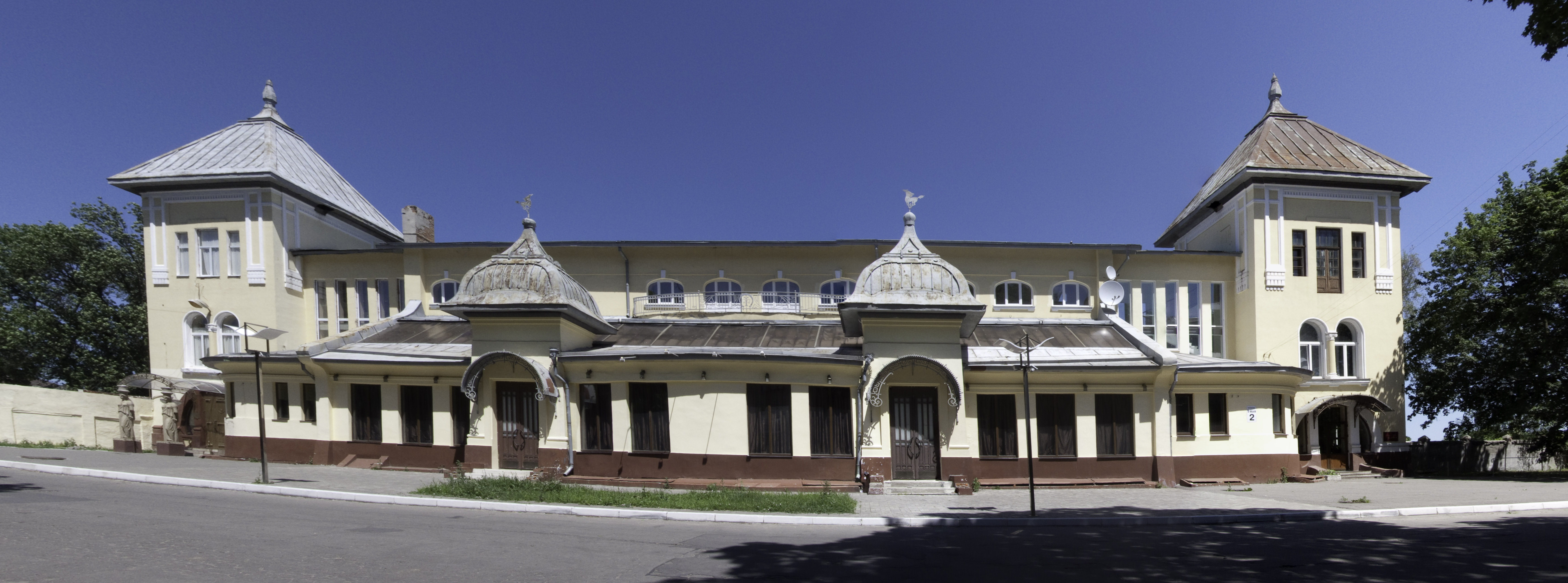 Харьковский ипподром